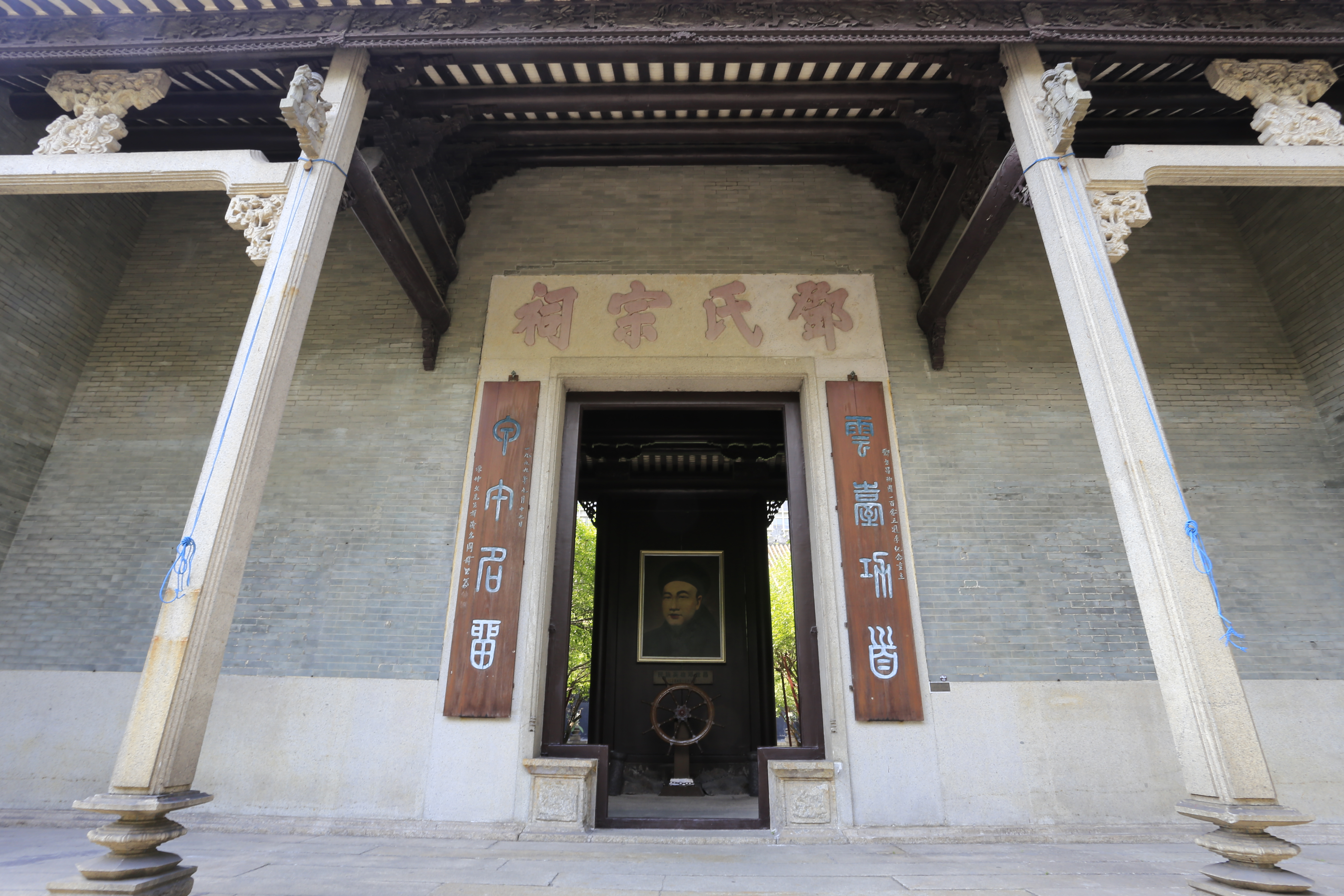 广州邓氏宗祠（邓世昌纪念馆）